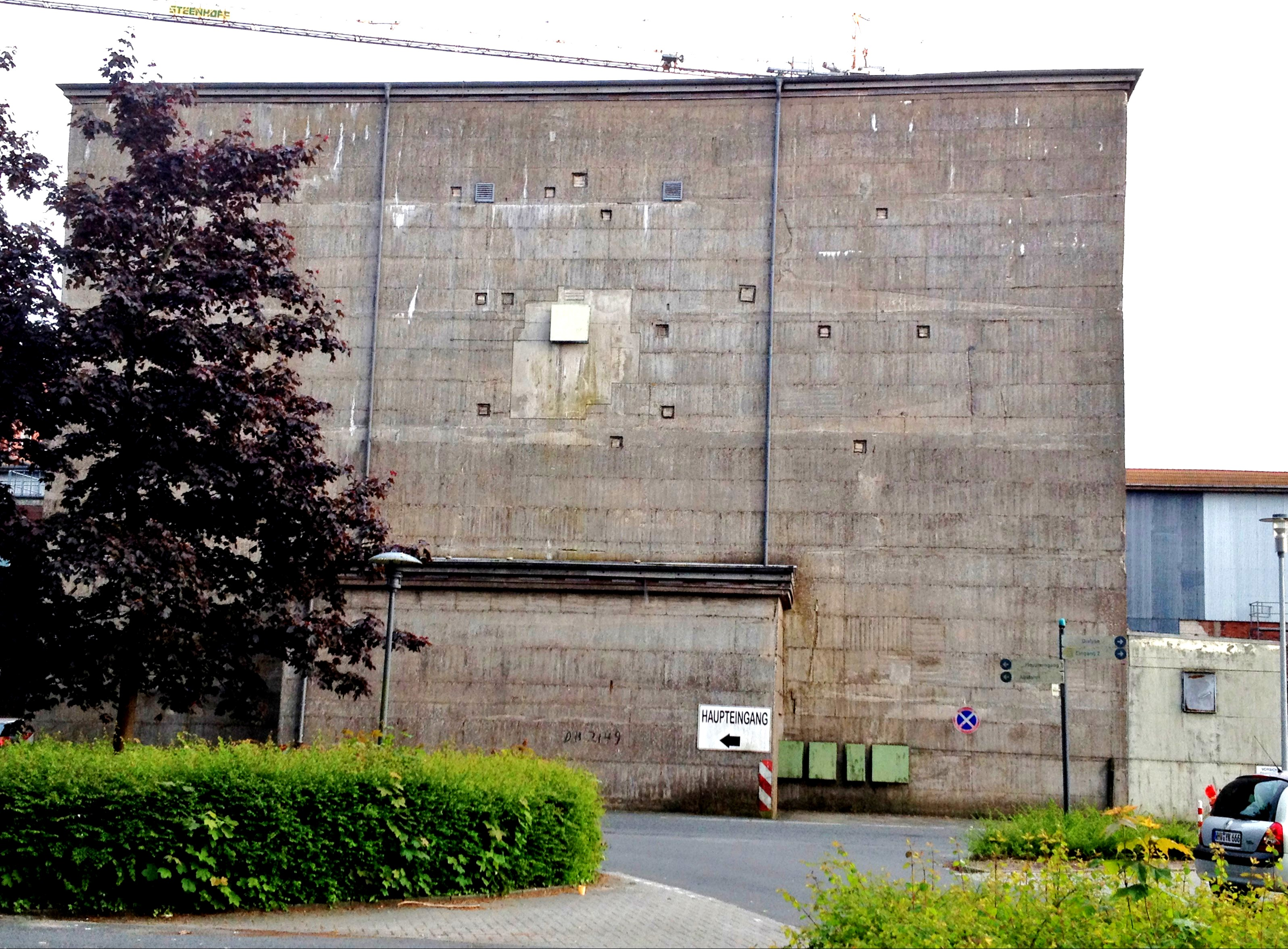 Weltkrieg II-Bunker am Nordwest-Krankenhaus Sanderbusch (Sande, Landkreis Friesland, Niedersachsen, Deutschland)